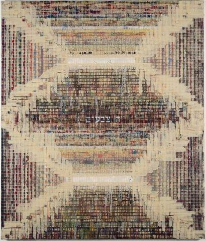 Painting